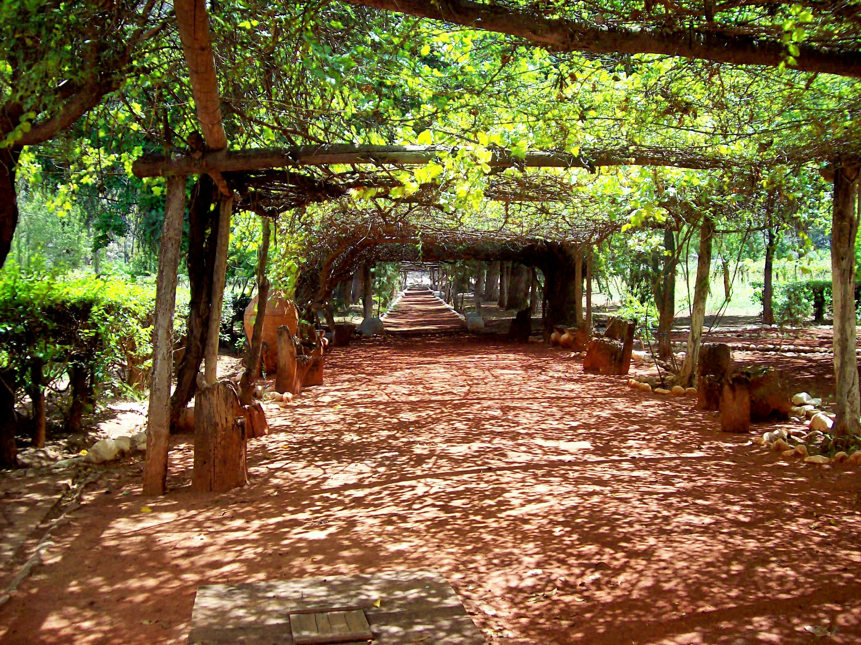 Vista de un camino cubierto de parras, en el jardín delantero de Samay Huasi (casa de descanso de los estudiantes de la Univ. Nac. de La Plata) en Chilecito, provincia argentina de La Rioja. El camino se encuentra en la la parte delantera, paralelo a la ruta 12, de la que se encuentra separada unos metros. La foto está tomada en dirección NO, aprox.